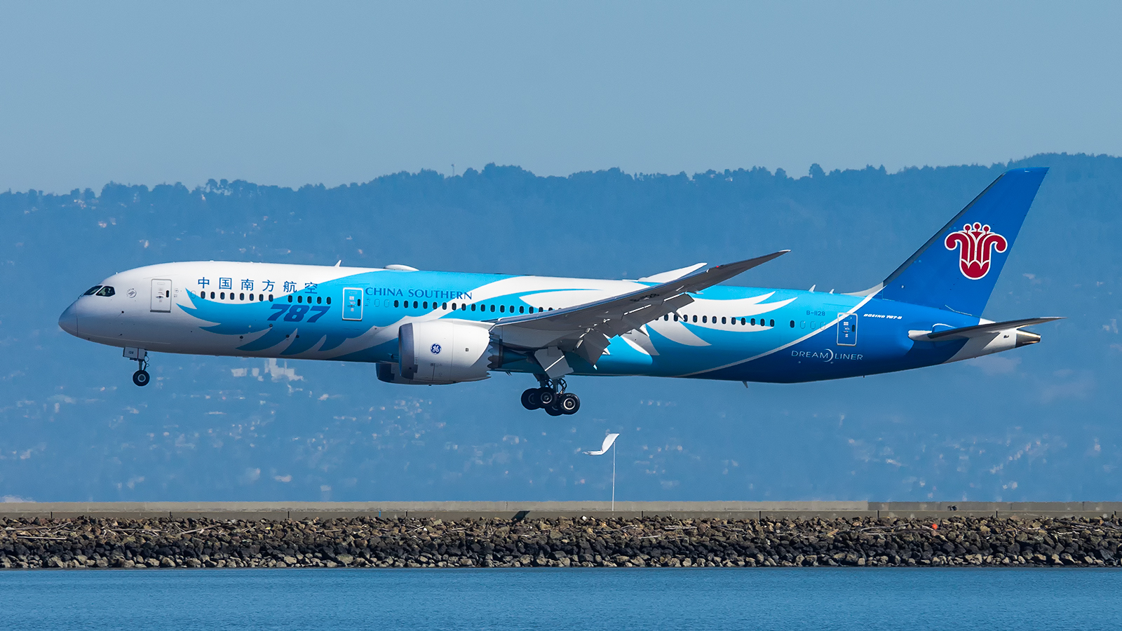 China Southern Airlines Boeing B787-9 (B-1128) at San Francisco International - 13 ottobre 2018